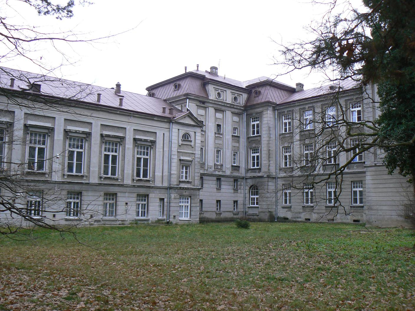 Samodzielny Specjalistyczny Zespół Zakładów Opieki Zdrowotnej w Rudce